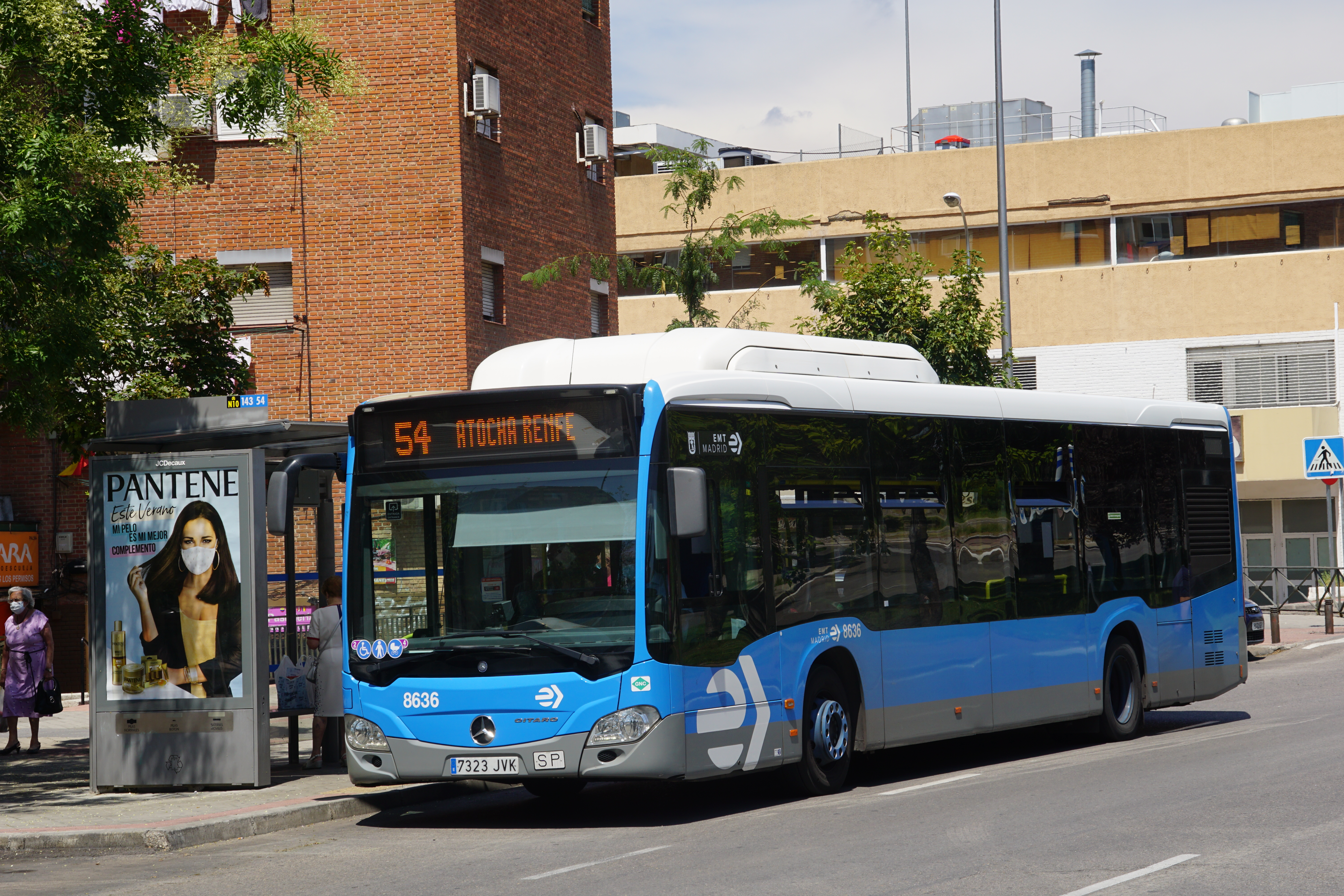 54 EMT Madrid en calle Pío Felipe